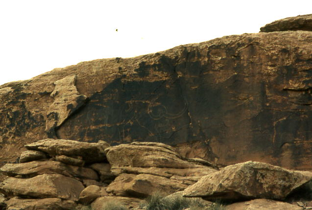 Gravures préhistoriques de la région d'Aflou, Algérie